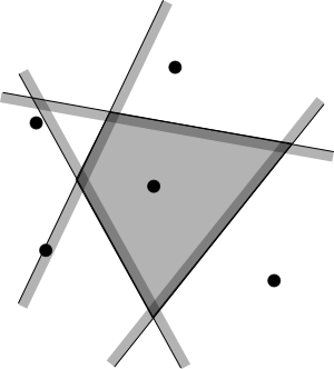 Чарунка діаграми Вороного утворена півплощинами.